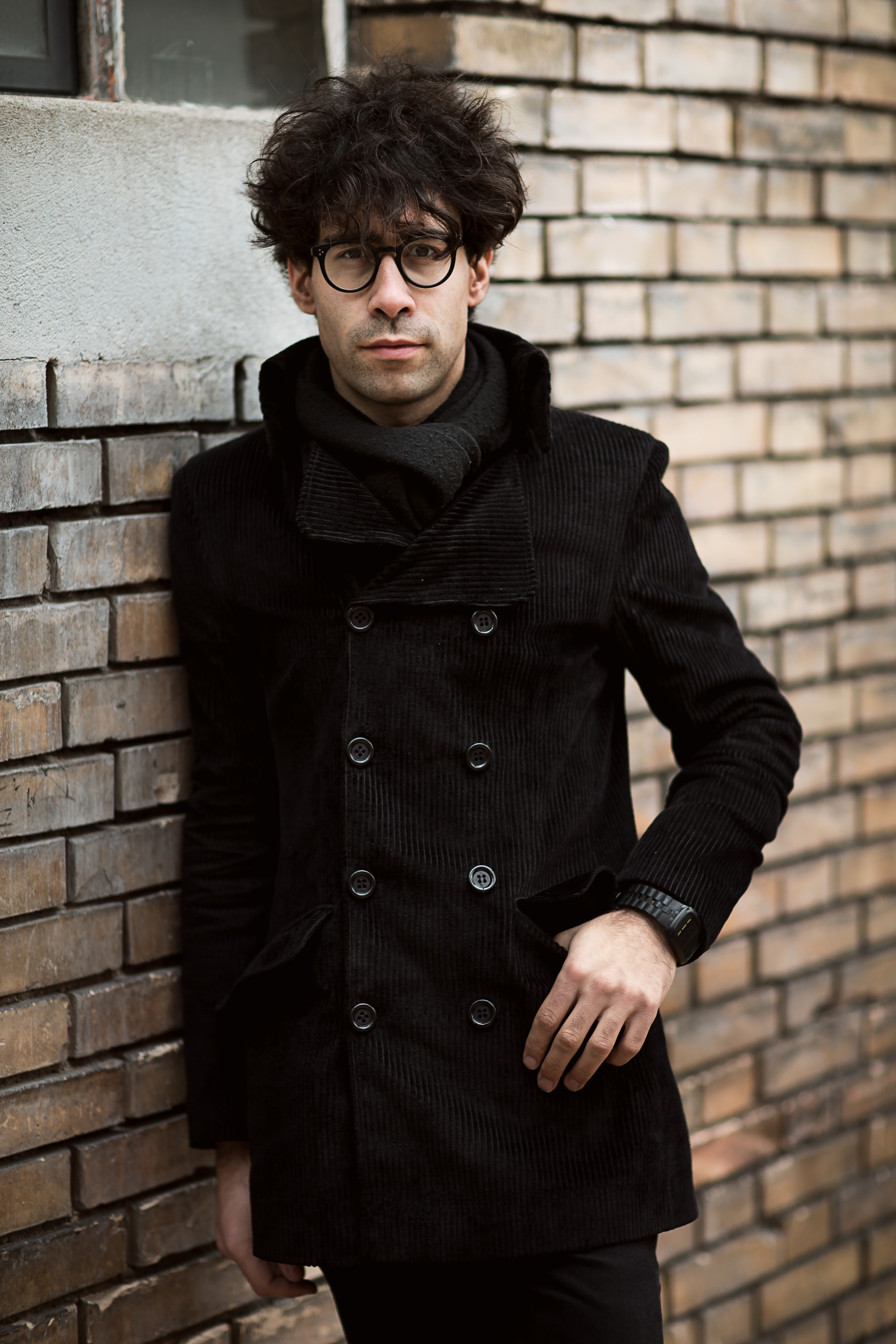 Noah Veraguth (Leadgesang, Gitarre, Klavier)